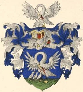 Pilar von Pilchau suguvõsa aadli- ja parunivapp